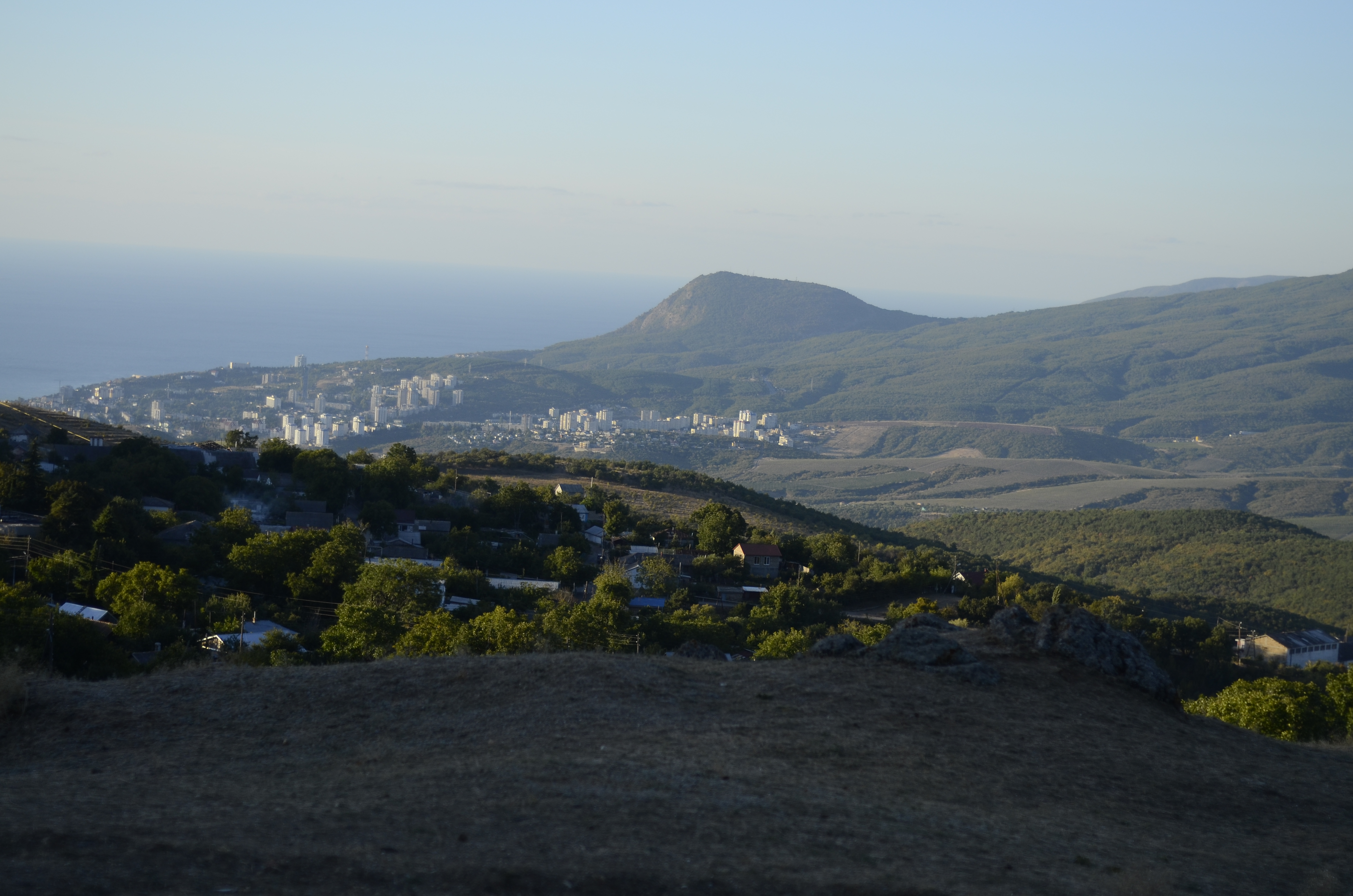 Алушта